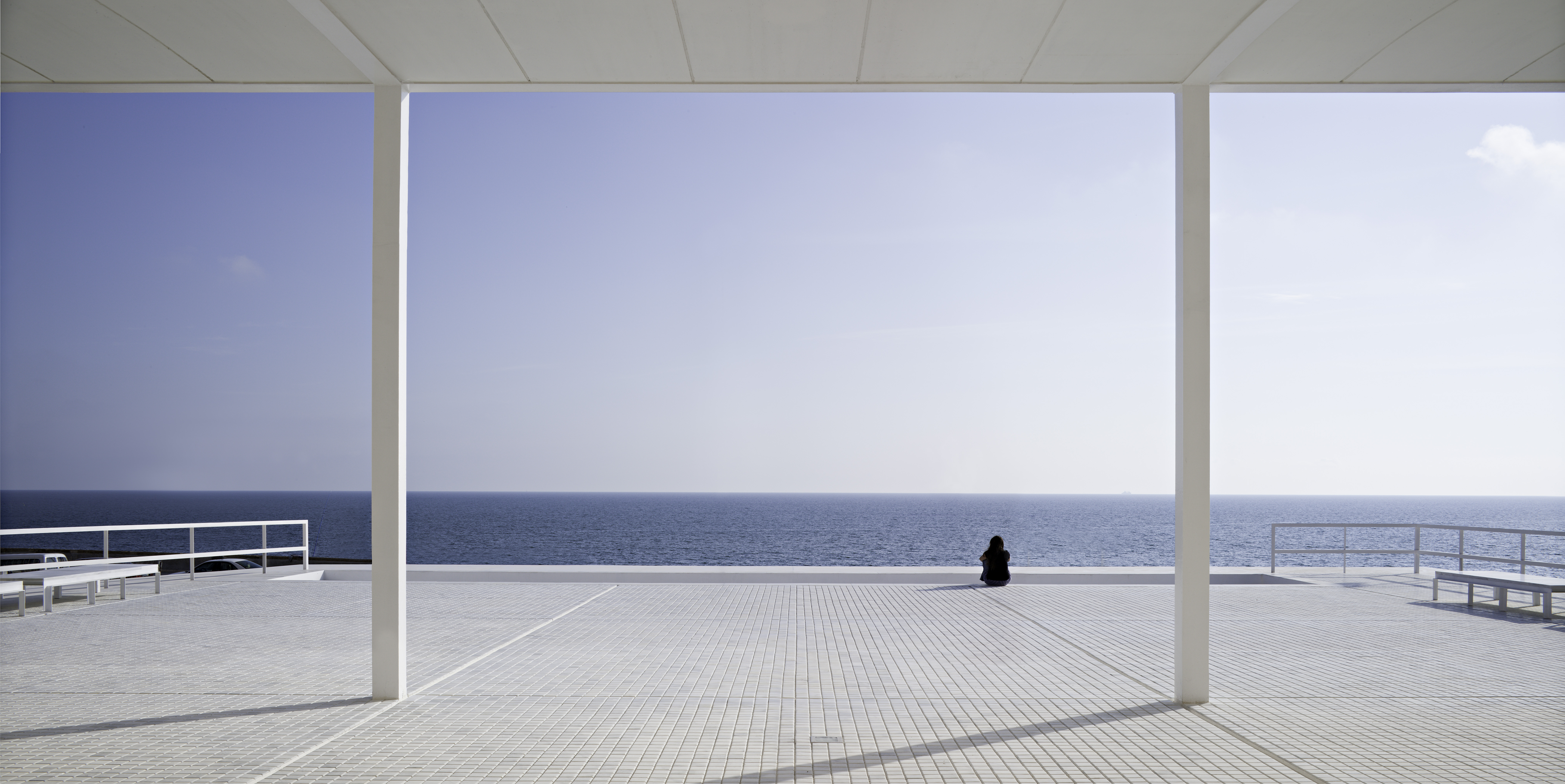 Vista del mar sobre la plataforma